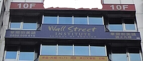 臺北市中正區館前路，華爾街美語館前分班招牌。